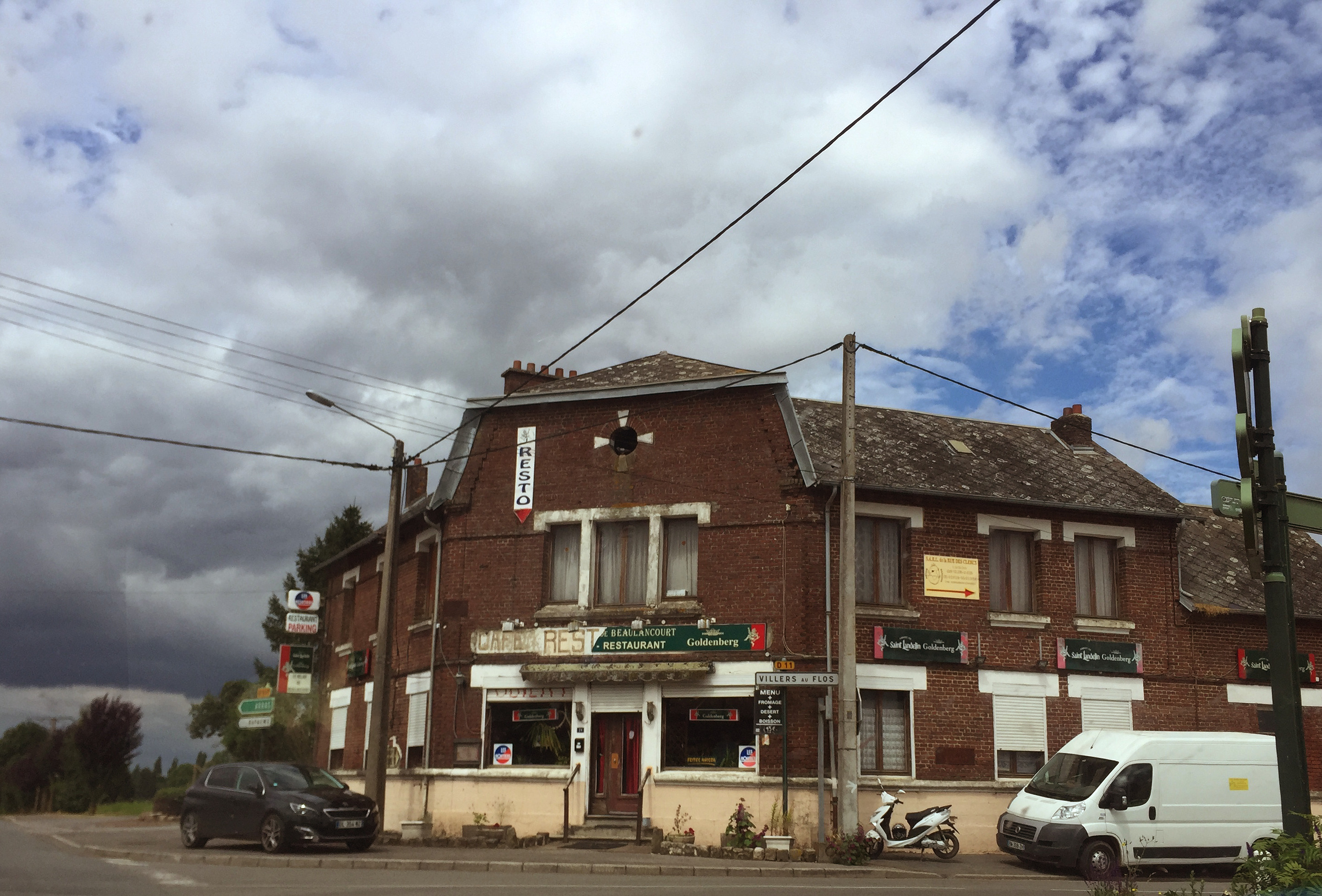 Een restaurant aan de voormalige Route Nationale 17 in Frankrijk